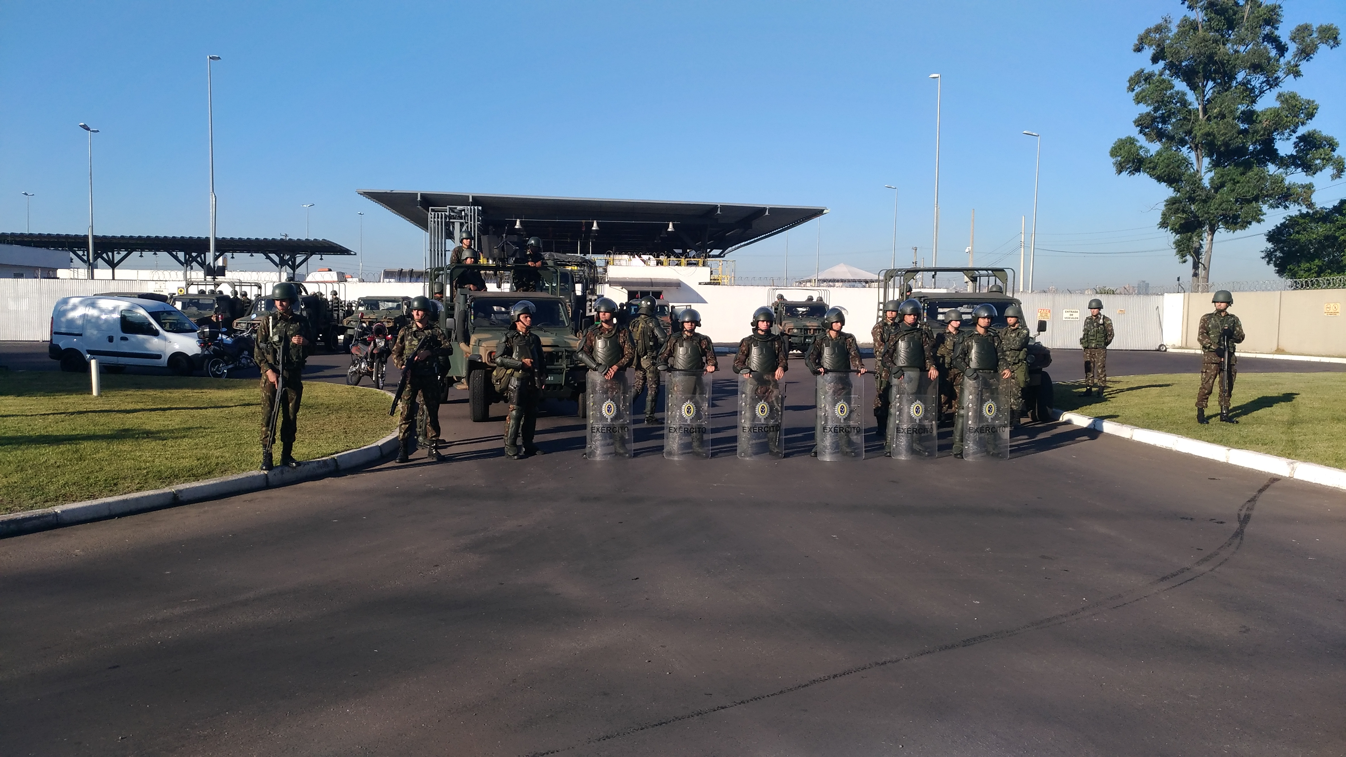 Exército aguarda chegada de combustível no Aeroporto Internacional Salgado Filho durante greve de caminhoneiros de 2018